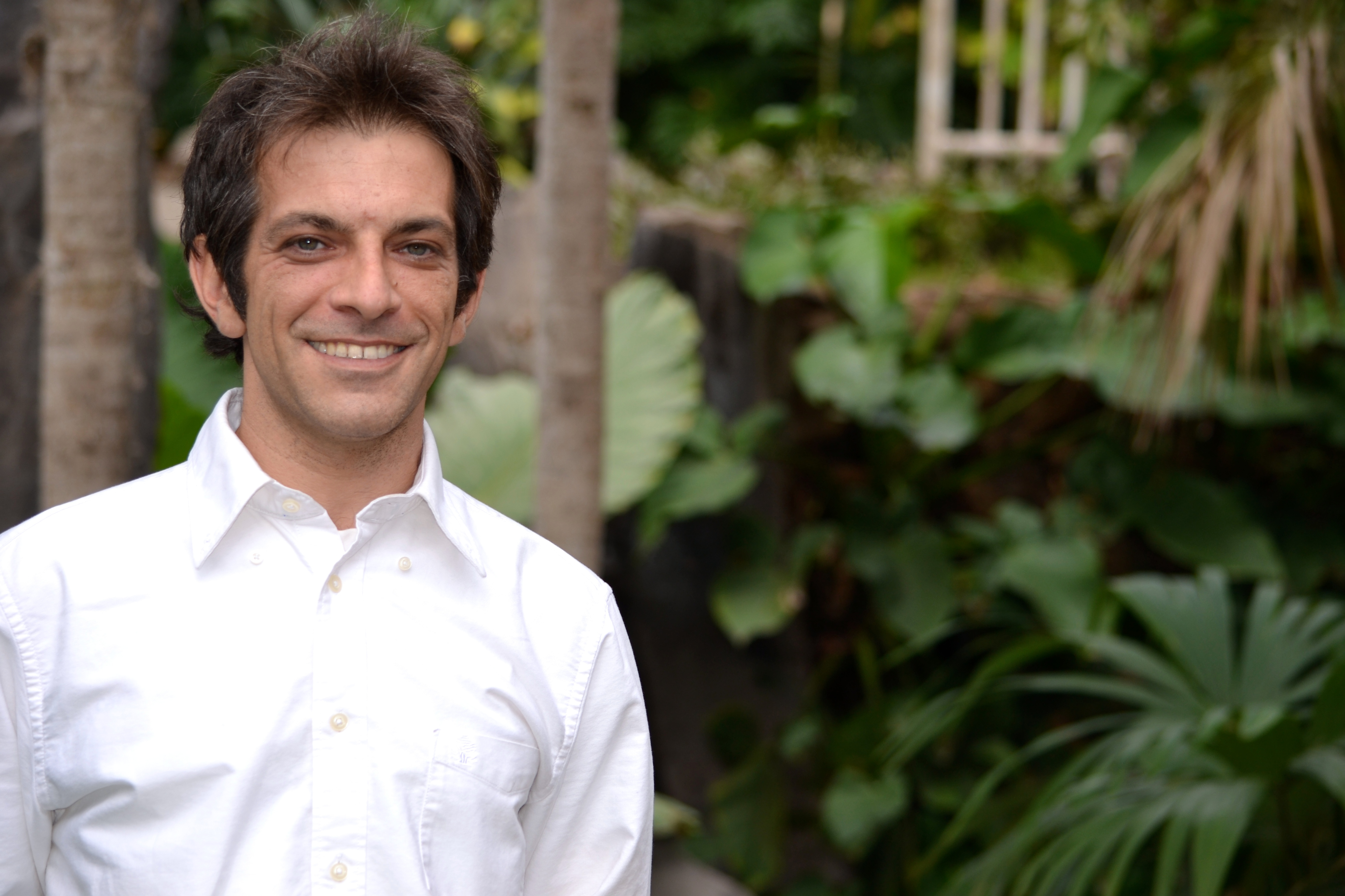 Colección Retratos Carlo Morici